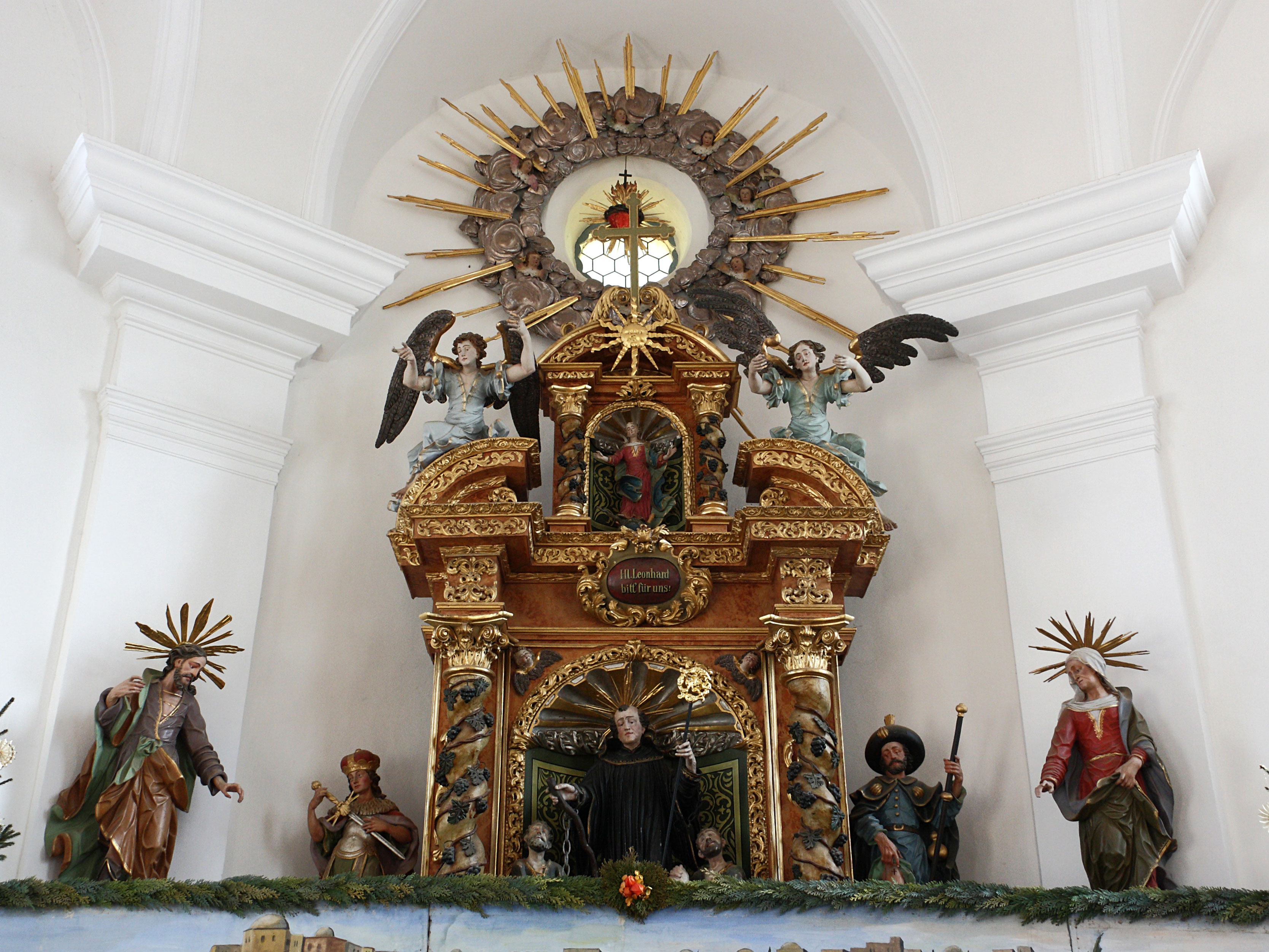 Kapelle St. Leonhard, Balzhausen; vom Krippenaufbau teilweise verdeckter Altar mit den Figuren des hl. Leonhard, flankiert von den Hll. Chlodwig (links, seinem Vater), und Rochus. Außen die Figuren der Eltern Marias, Joachim und Anna. In der Nische des Segmentgiebels Figur der Immaculata, beidseits davon sitzende Engel.